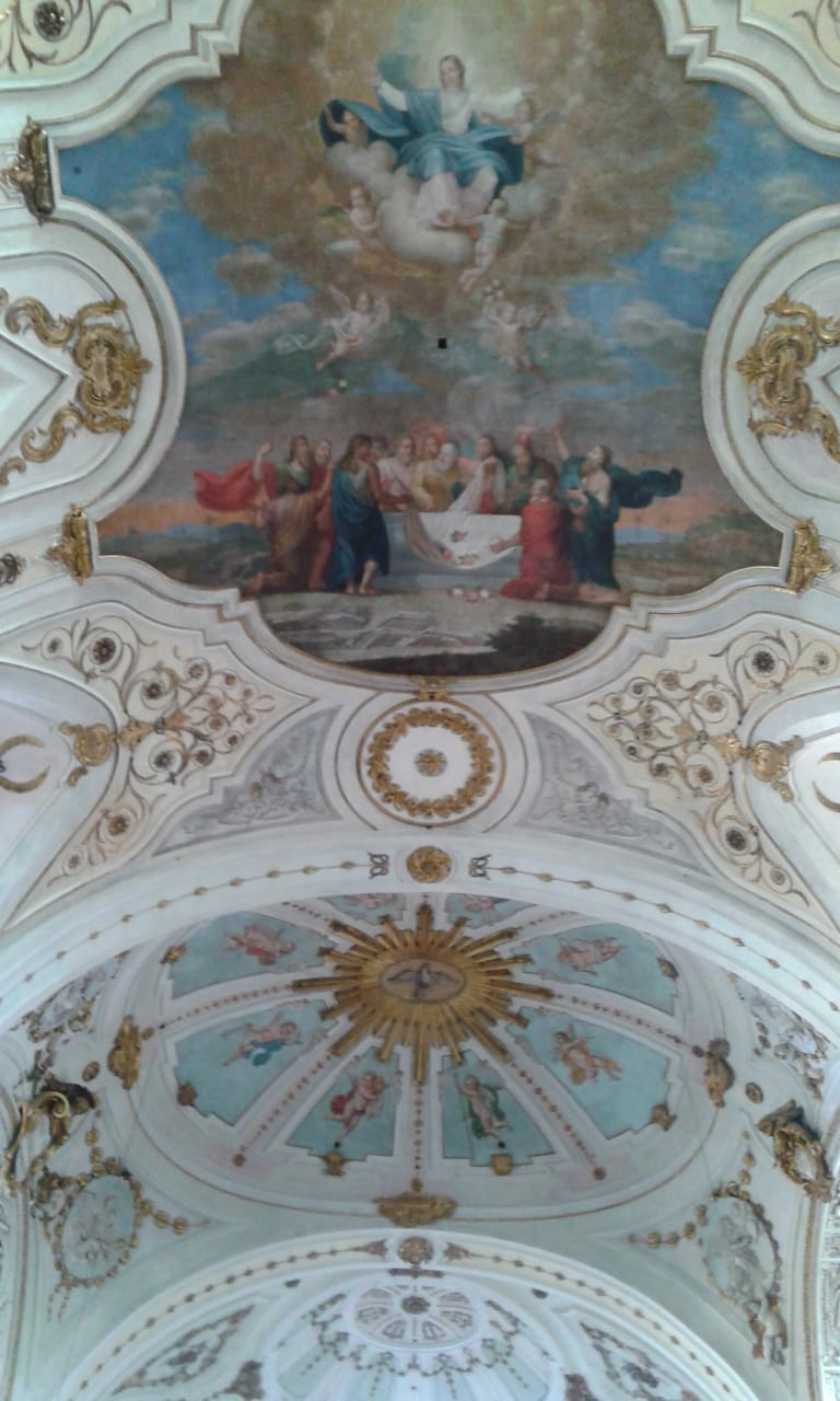 Volta della chiesa di Santa Chiara, a Chieti, con pannello della prima metà del diciannovesimo secolo raffigurante l'Assunzione di Maria e realizzato dal pittore chietino Raffaele Del Ponte.